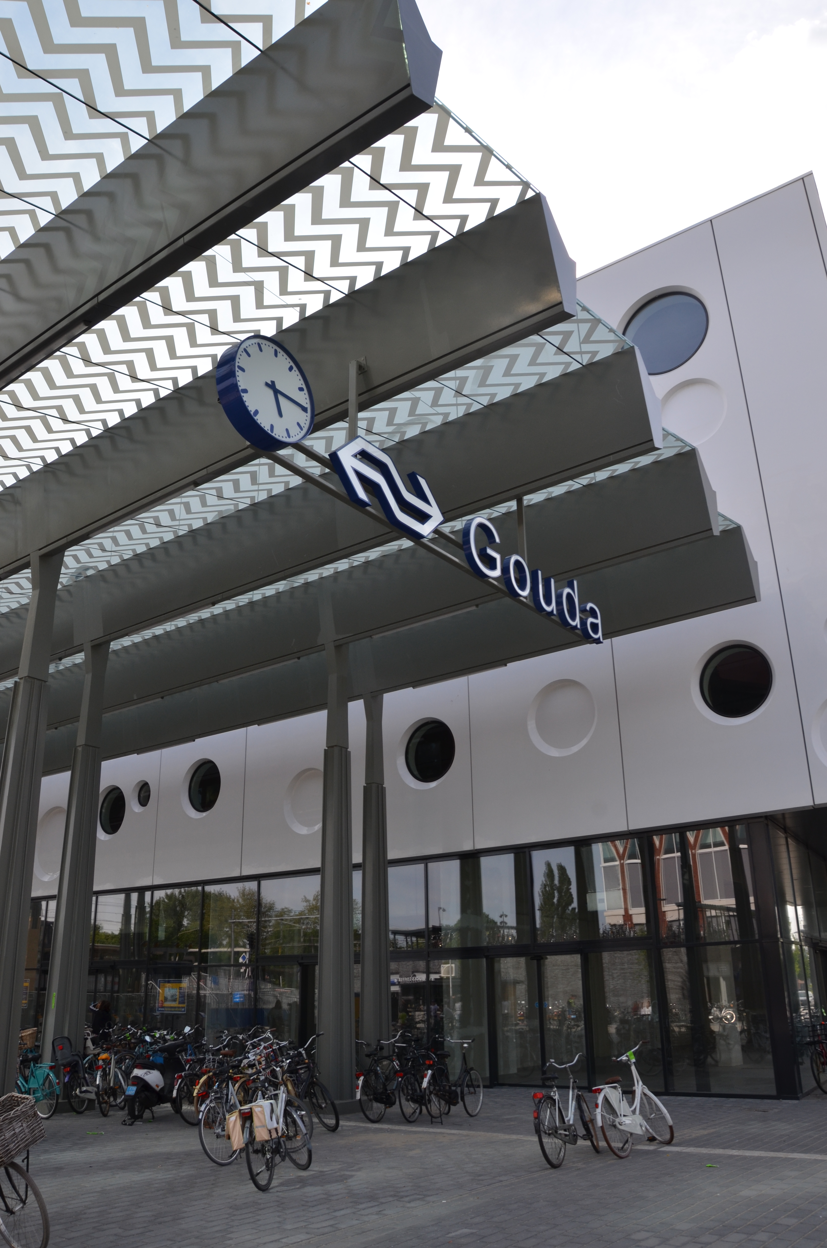 Station Gouda in 2015.